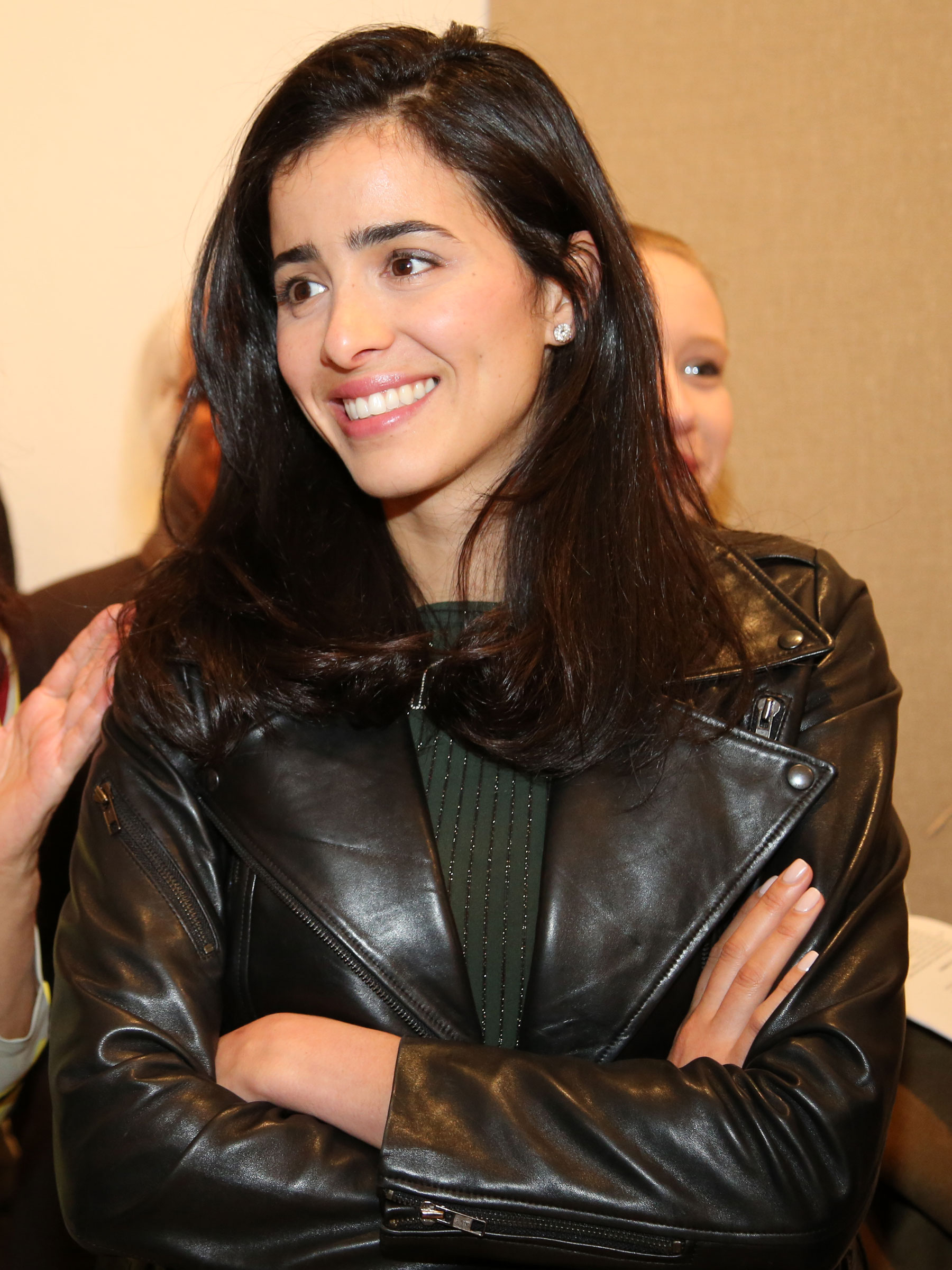 Lazaar-Jameel_Lina-9146